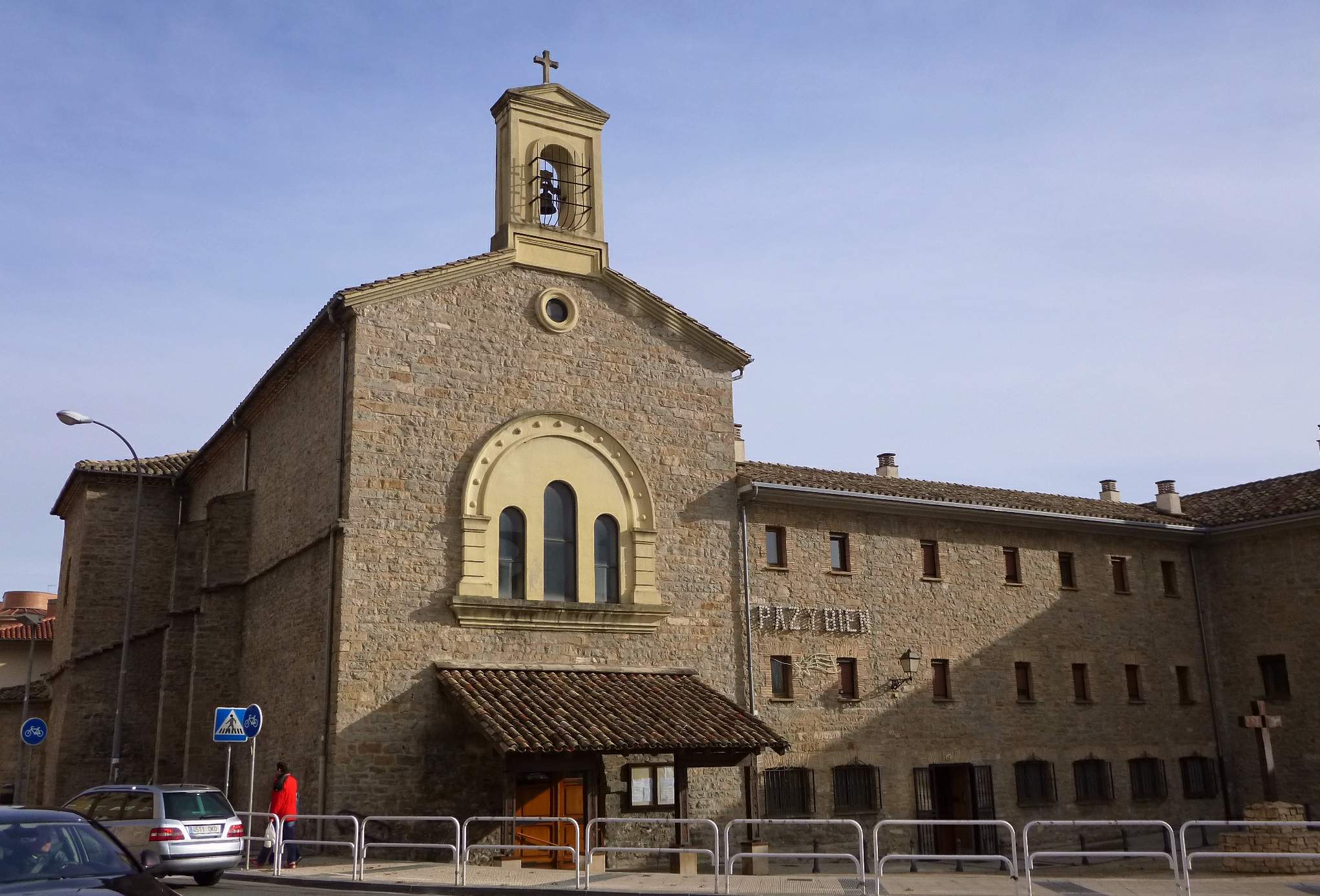 Convento de los Capuchinos Extramuros (Pamplona)